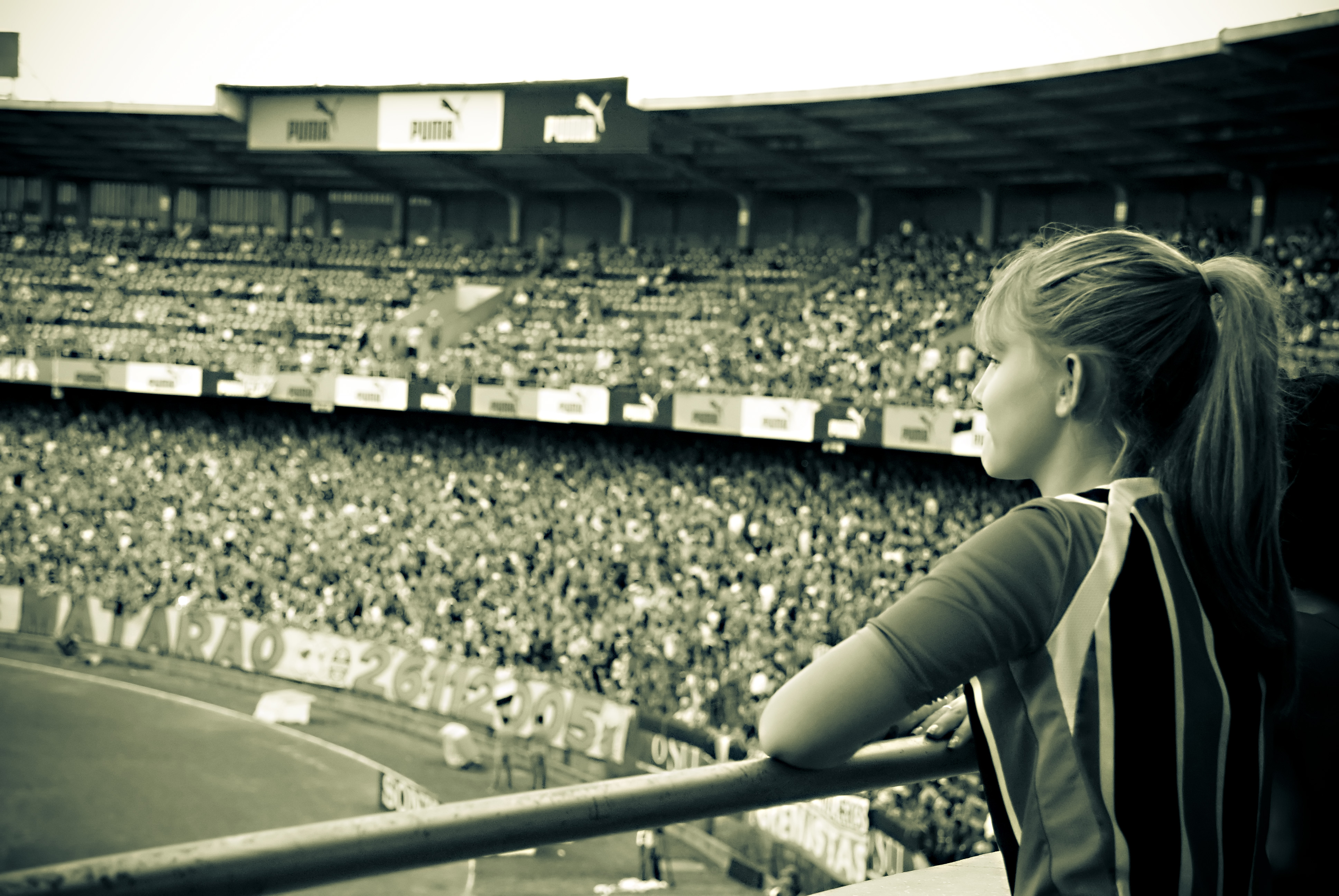 Deisy: ¿A quién le vas? Yo: Al Grêmio. Deisy: ¡Noo! ¡Tienes que irle al Internacional. ¡Son campeones del mundo! ¡Además, los del Grêmio son racistas! Flávia: ¡Ey! ¡No! ¡Hace mucho que ya no son racistas! No le hagas caso. El Grêmio también ha sido campeón del mundo. (International are the bad guys, ok?) ¡Viva Pumas!